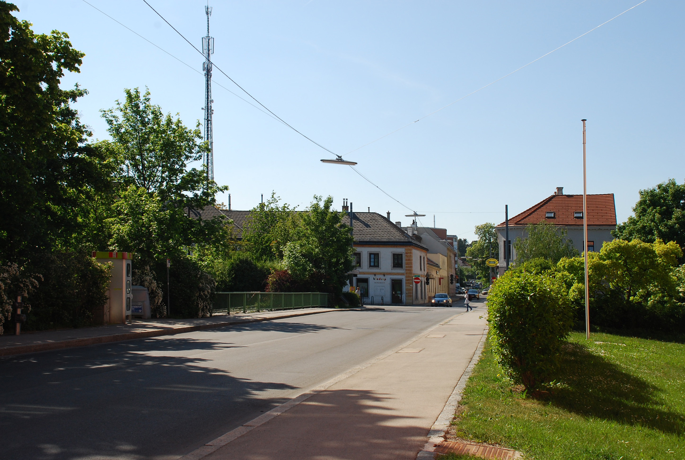 ehemaliges Mühlengebäude in Wien Liesing.